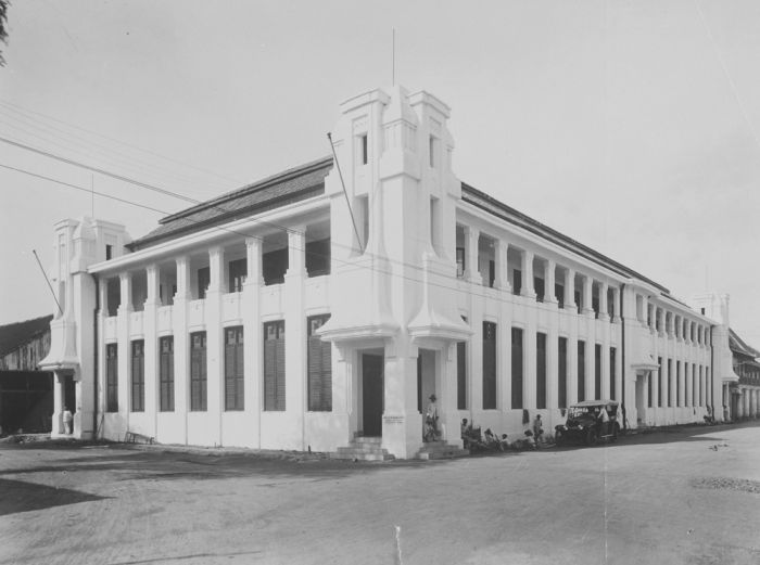 foto. Kantoorgebouw van de Koninklijke Paketvaart Maatschappij te Semarang